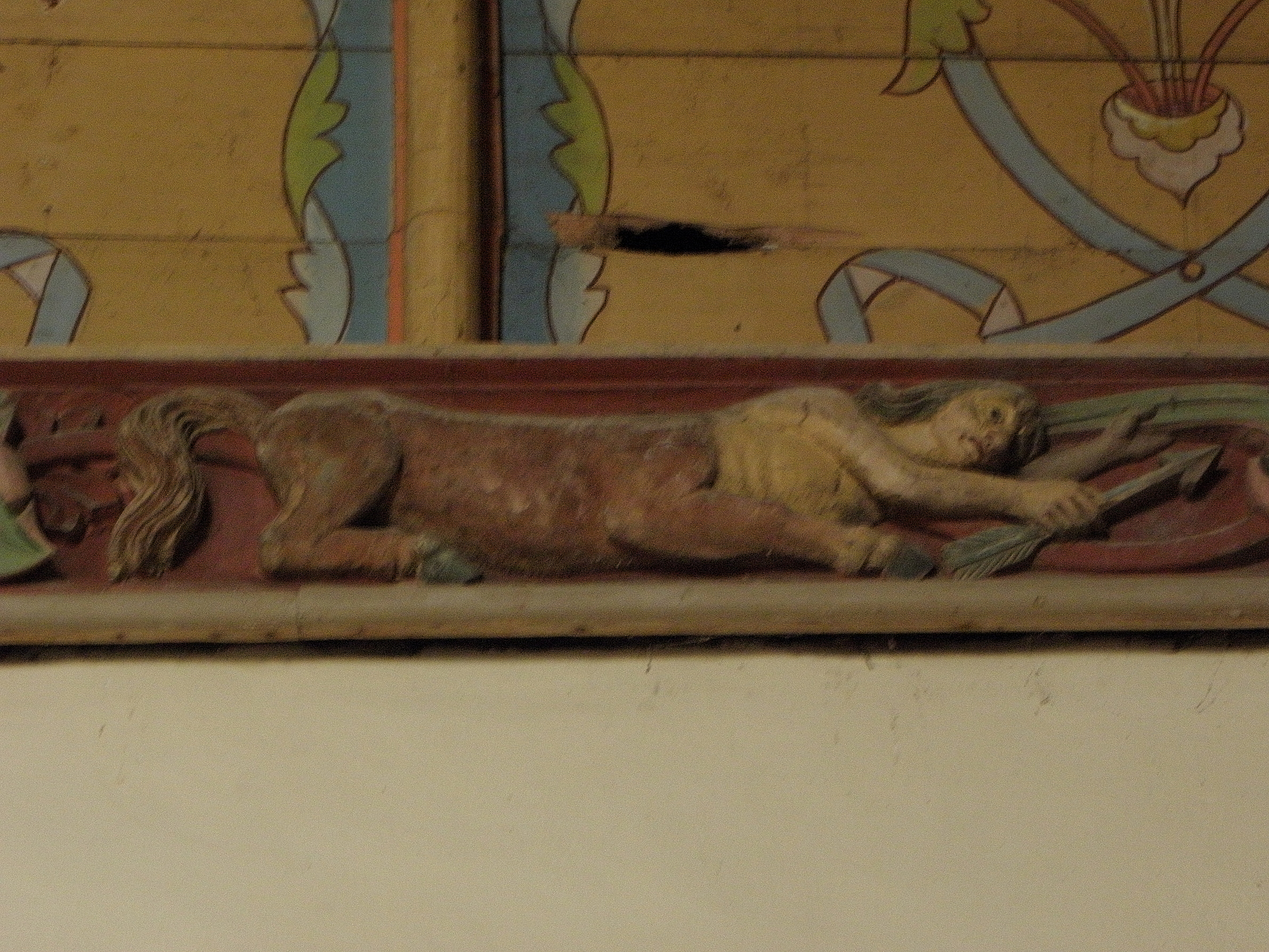 Sagittaire. Sablière de la nef de l'église Notre-Dame de Runan (22). .